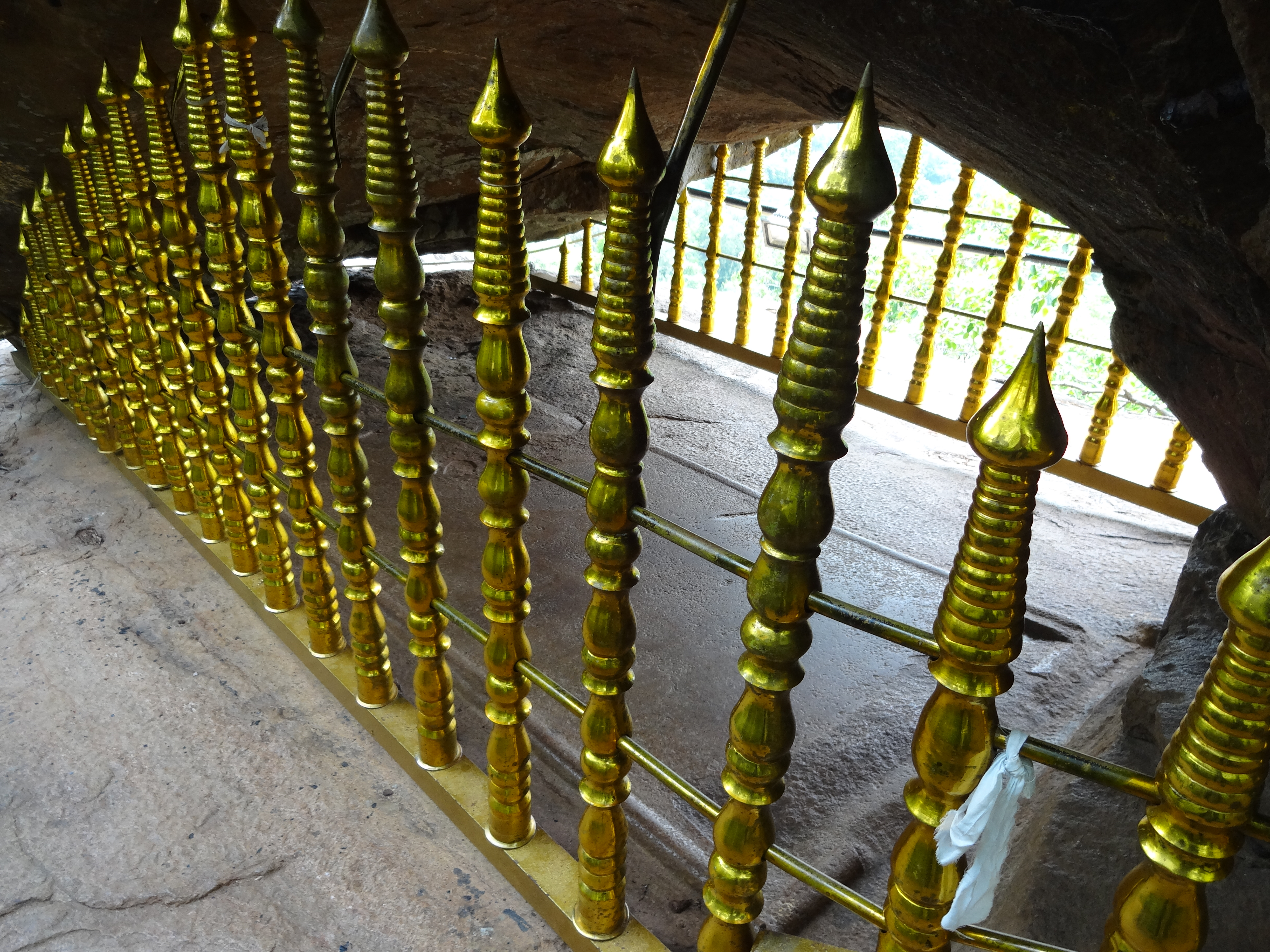 das sogenannte Mahindabett am Fuße des Aradhana Gala in Mihintale in Sri Lanka